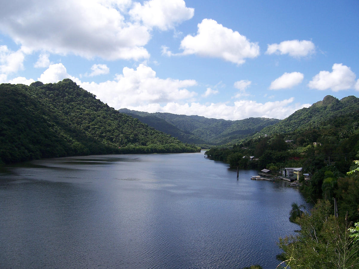 Lago Dos Bocas Lake in Utuado Puerto Rico